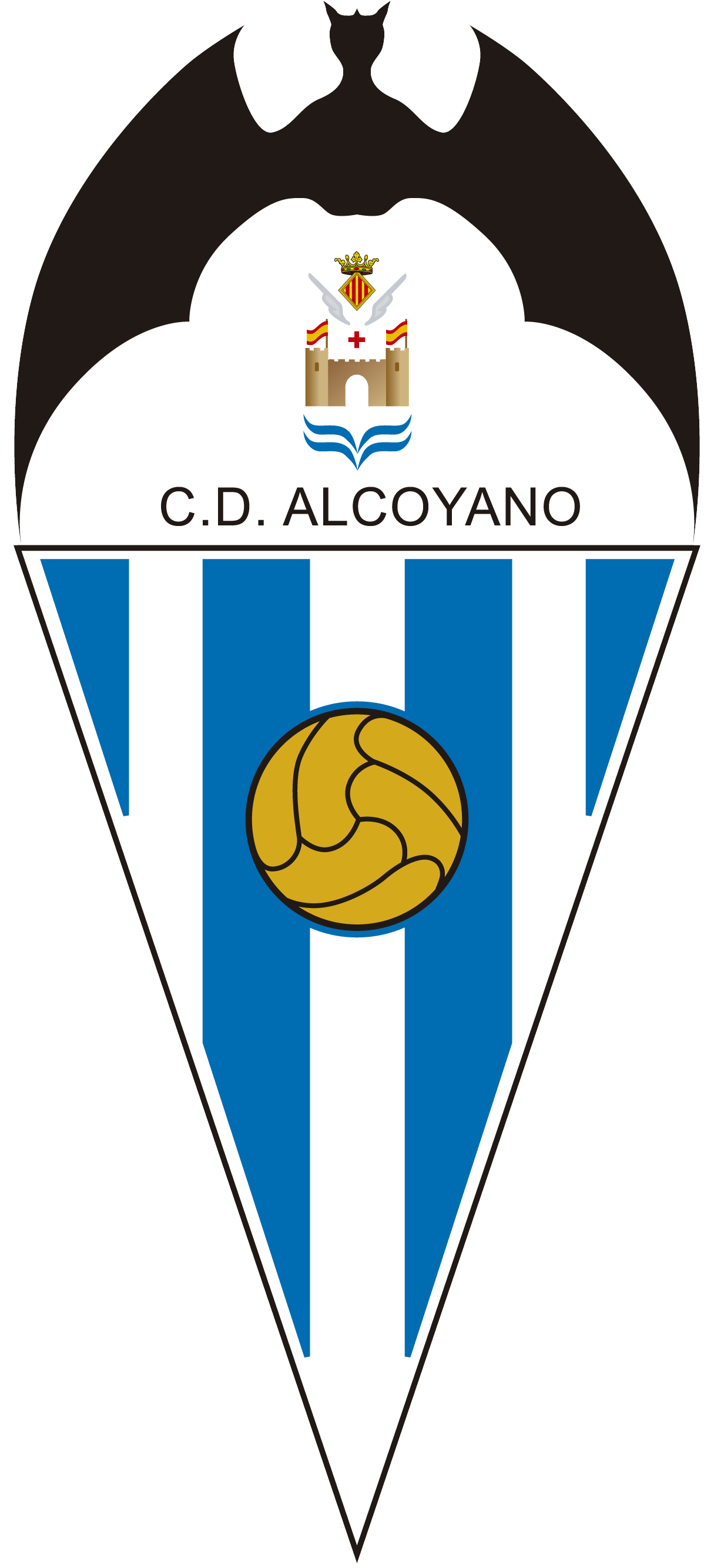 Escudo Oficial del Club Deportivo Alcoyano